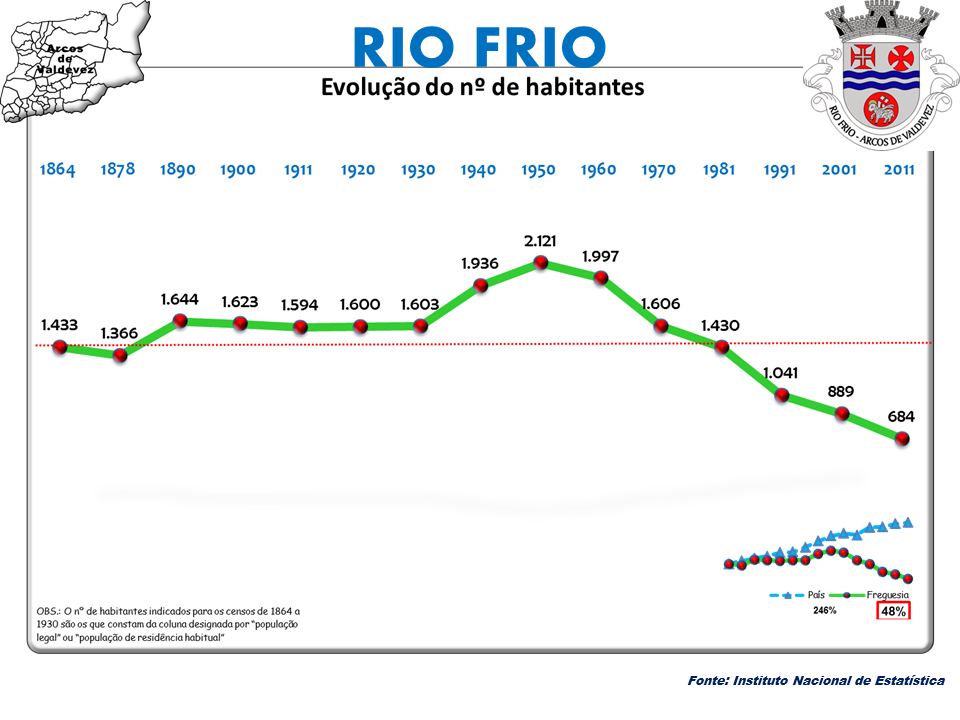 Censos 1864/2011